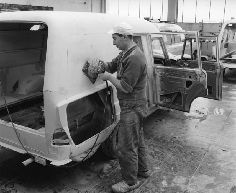 Bonn, Januar 1964 Fahrzeug+Karosseriewerke Chr. Miesen maschinelles Schleifen der Grundierung